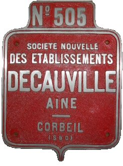 Plaque constructeur de locomotive Decauville. Cliché Fabien HALLIER, mars 2005